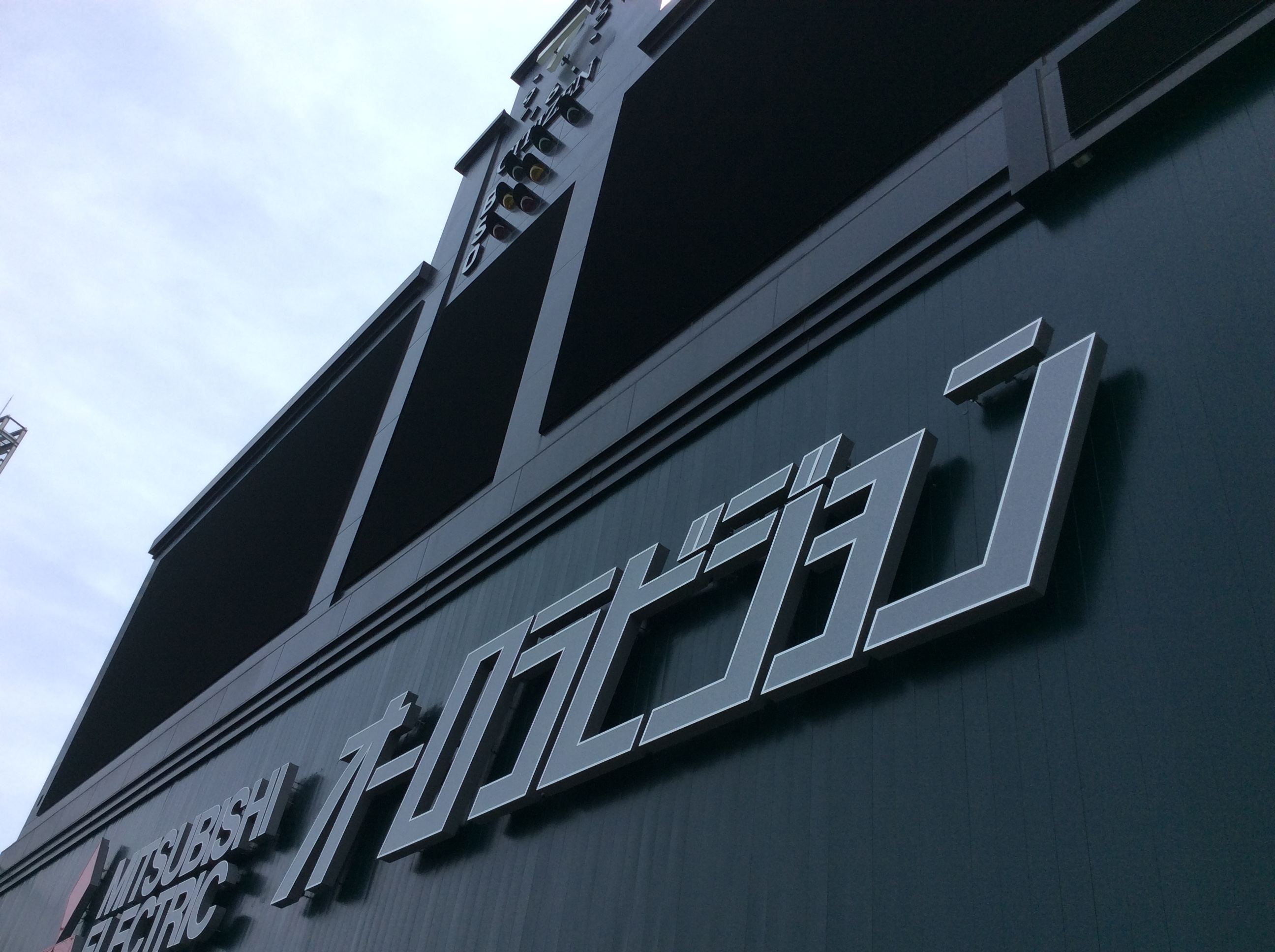 バックスクリーン下からバックスクリーンを望む